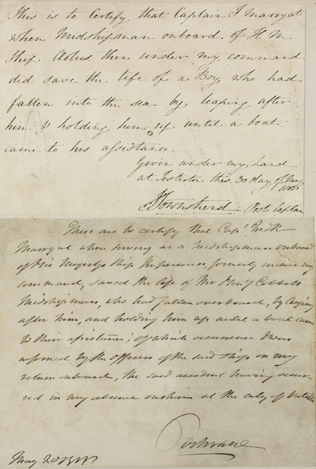 Briefe der Marryat-Familie